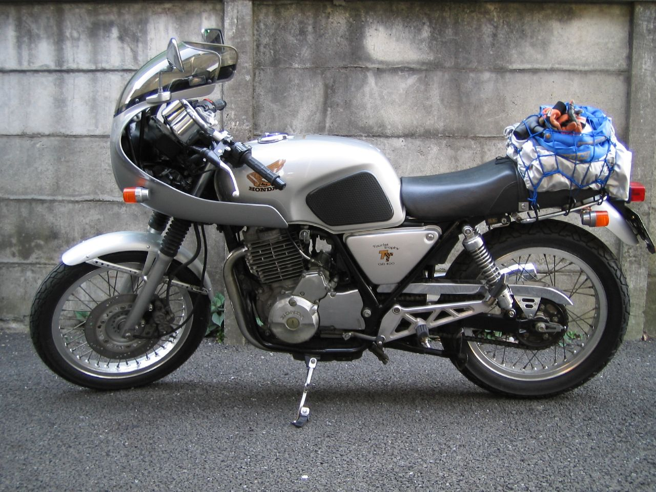 Honda GB400TT